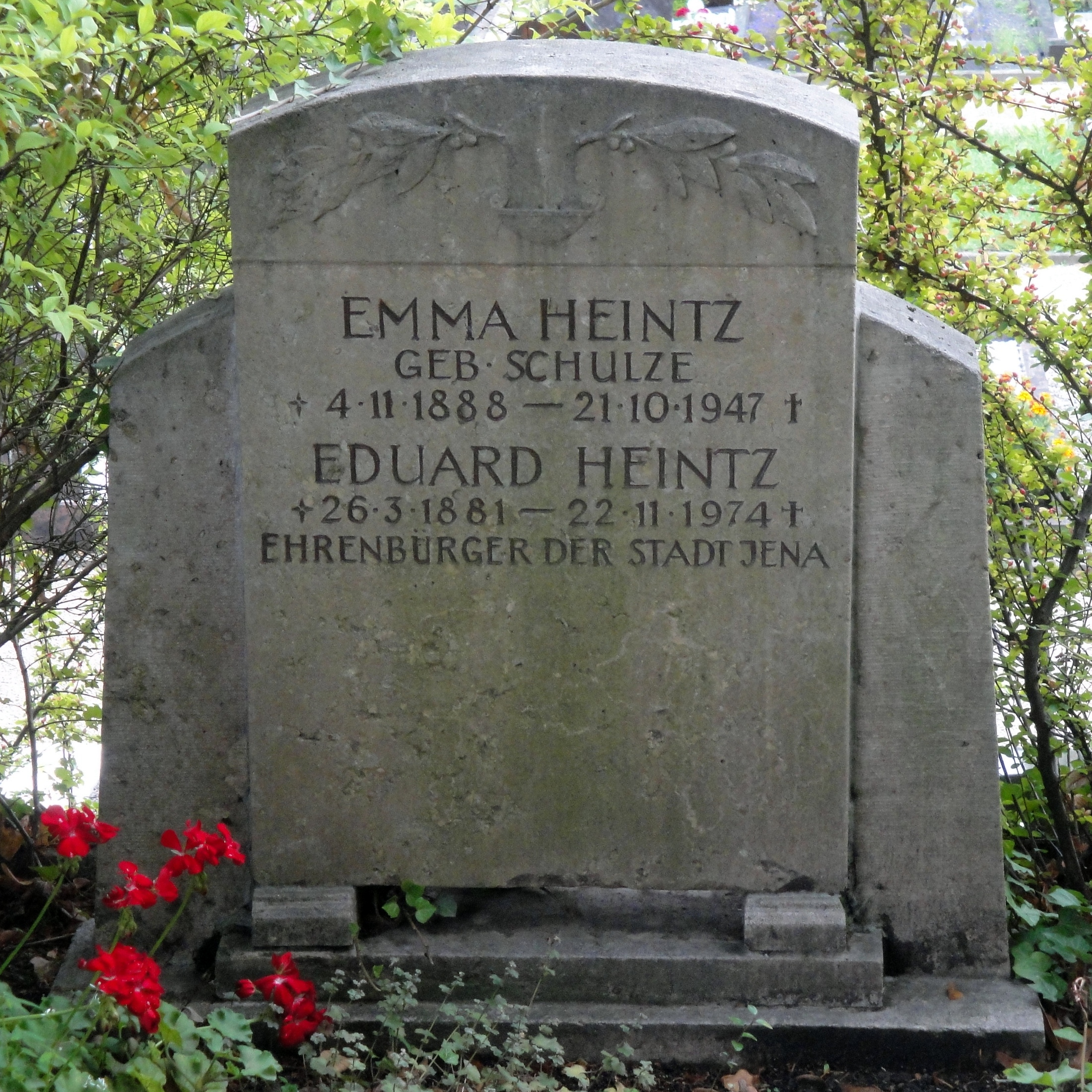 Grab von Eduard Heintz und Emma Heintz auf dem Nordfriedhof in Jena